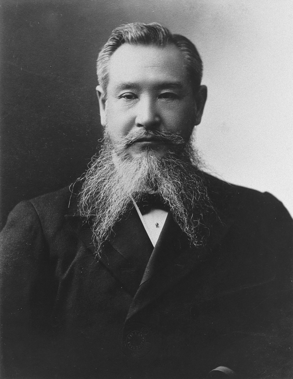 Portrait of Kono Hironaka (河野広中, 1849 – 1923)